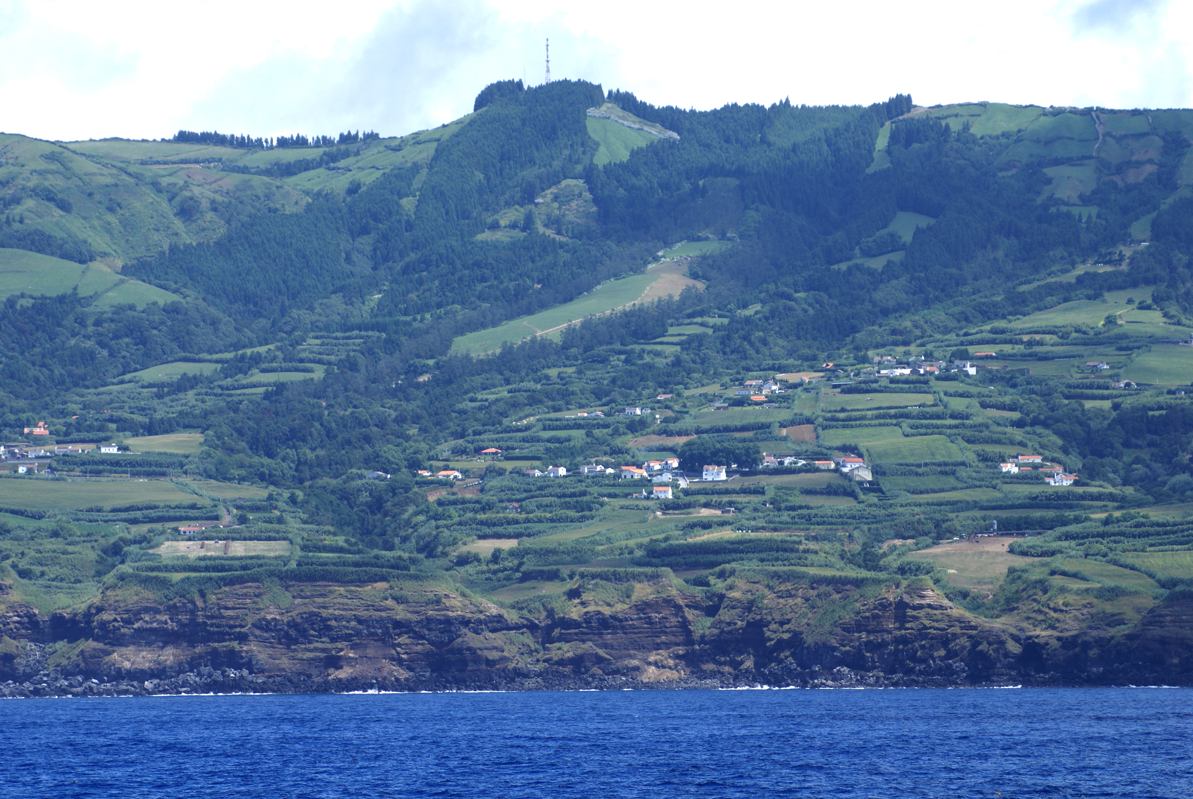 Ginetes visto do mar, Ponta Delgada, ilha de São Miguel, Açores